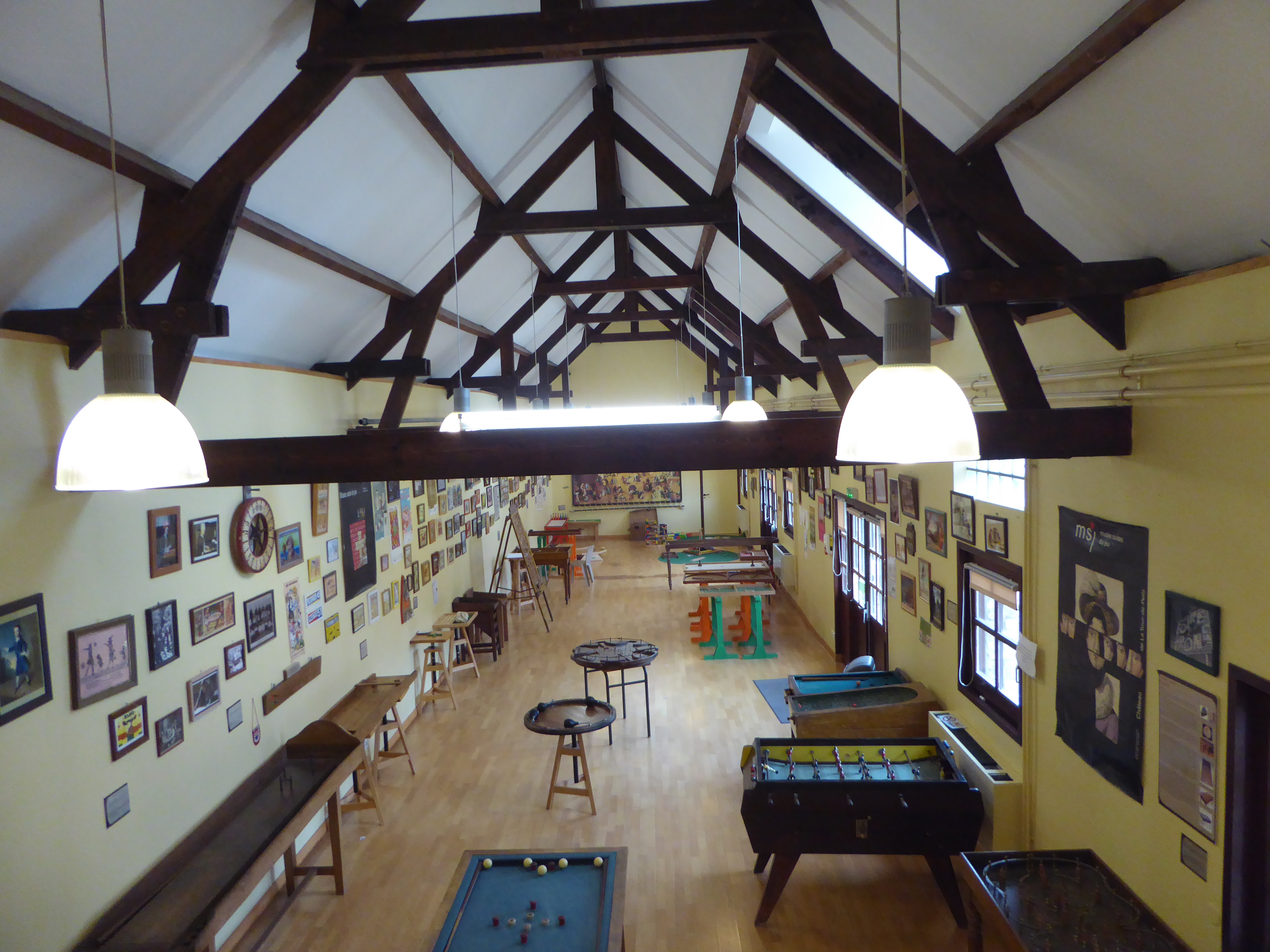 La salle des jeux de la ferme Galamé Musée des jeux traditionnels Loon-Plage Nord Hauts-de-France